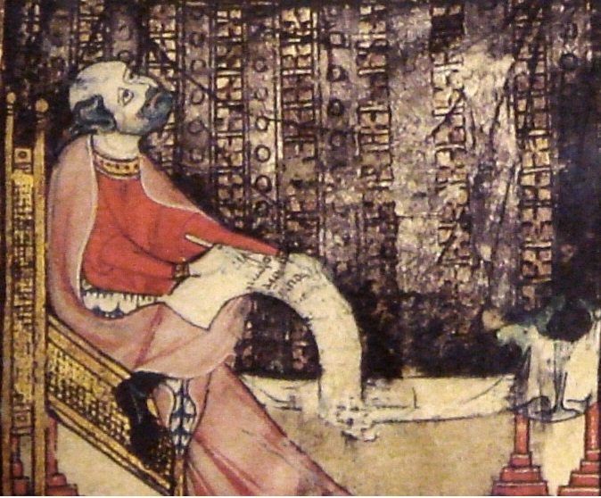 Ramon Llull en el moment de les visions que propiciaren la seva dedicació religiosa